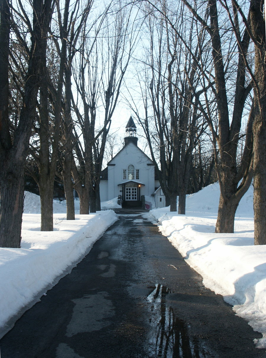 Photographie de l'église de la municipalité de Rosemère